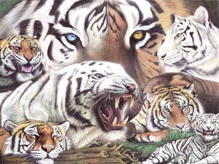 Dessin réalisé au stylo bille.